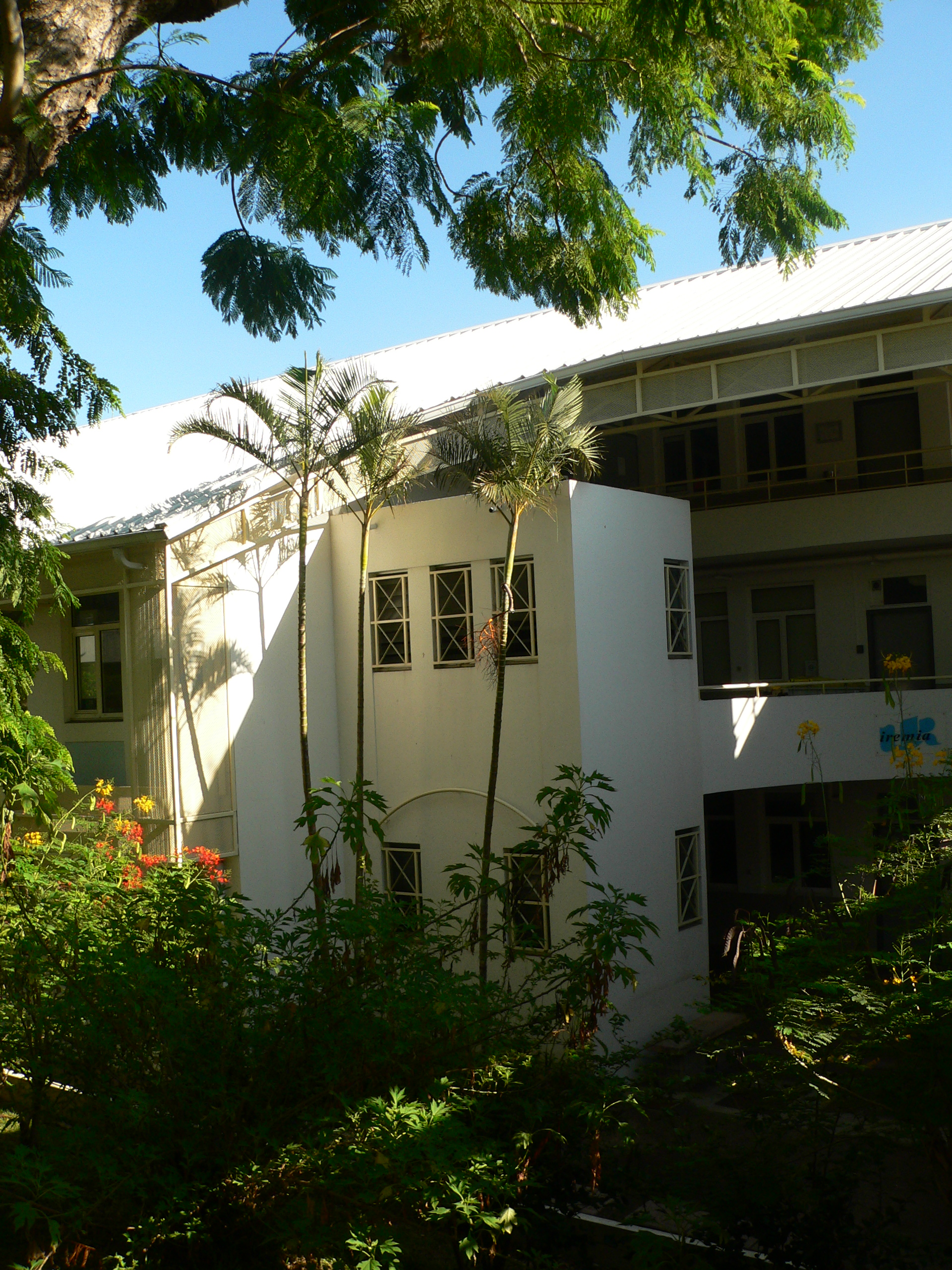 Université de la Réunion, campus du Moufia, bâtiment S4b : IREMIA